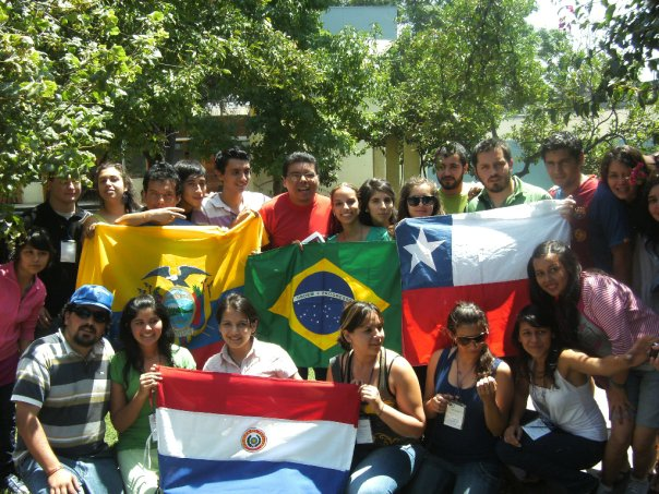 Encuentro Sudamericano Jufra